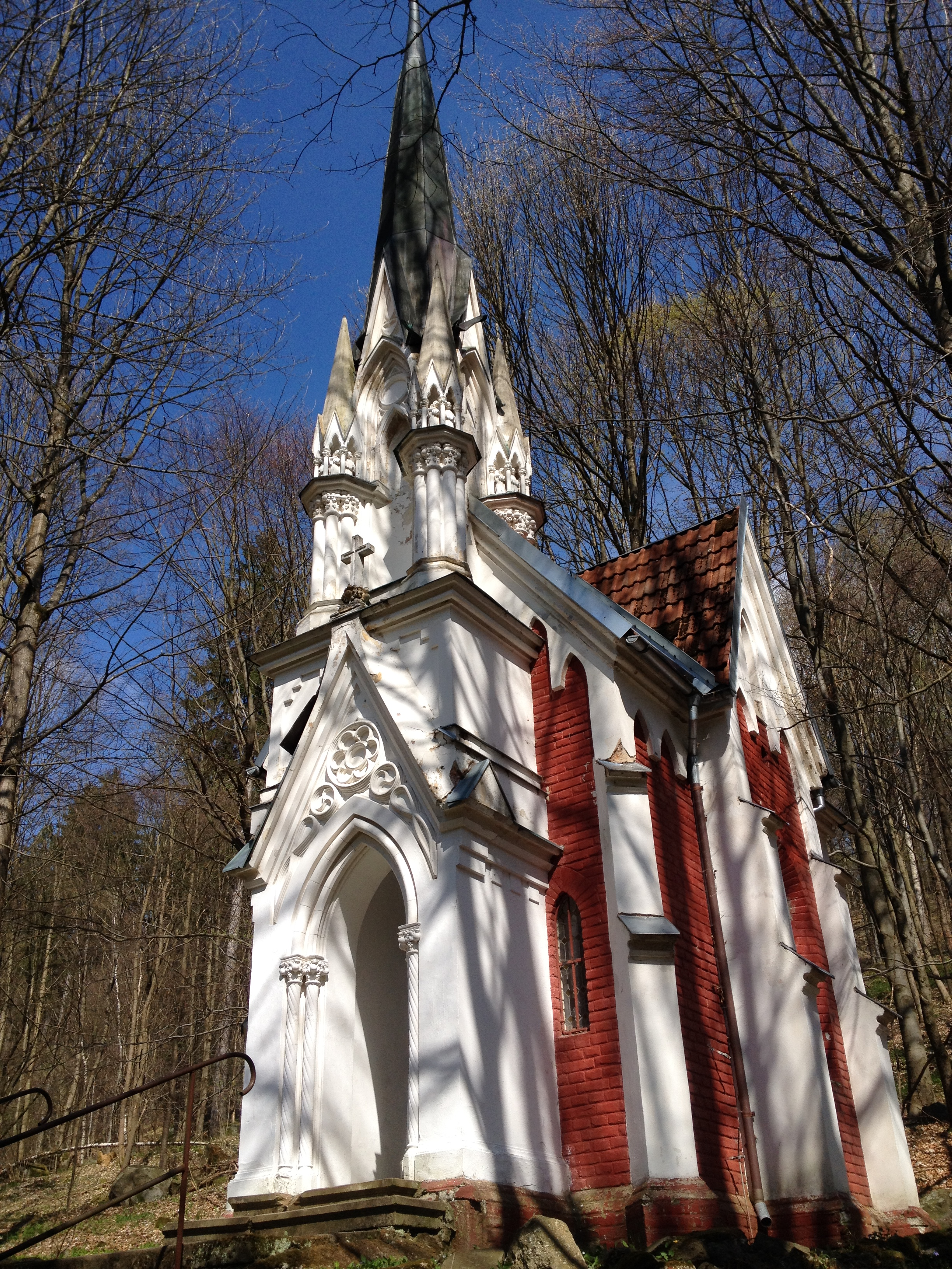 Kaple Bolestné Panny Marie, Mariánské Lázně, park nad Chopinovou ulicí, Mariánské Lázně.